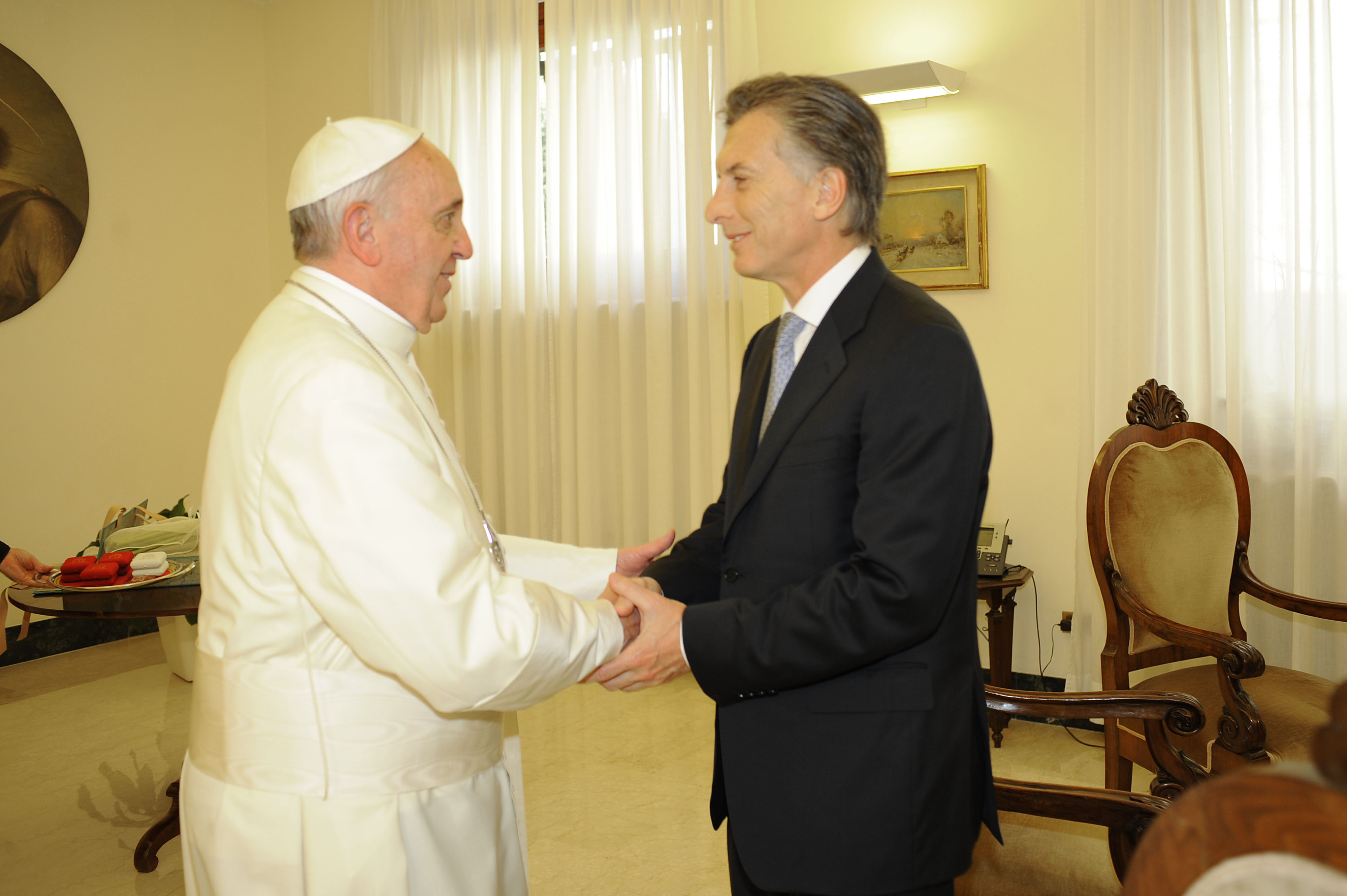 Ciudad del Vaticano. Setiembre 19 de 2013. El Papa Francisco recibió hoy en el Vaticano al Jefe de Gobierno de la Ciudad de Buenos Aires, Mauricio Macri, en una audiencia privada a la que concurrió junto a su esposa Juliana Awada y la hija de ambos, Antonia.- Foto Antonello Nusca/GCBA.